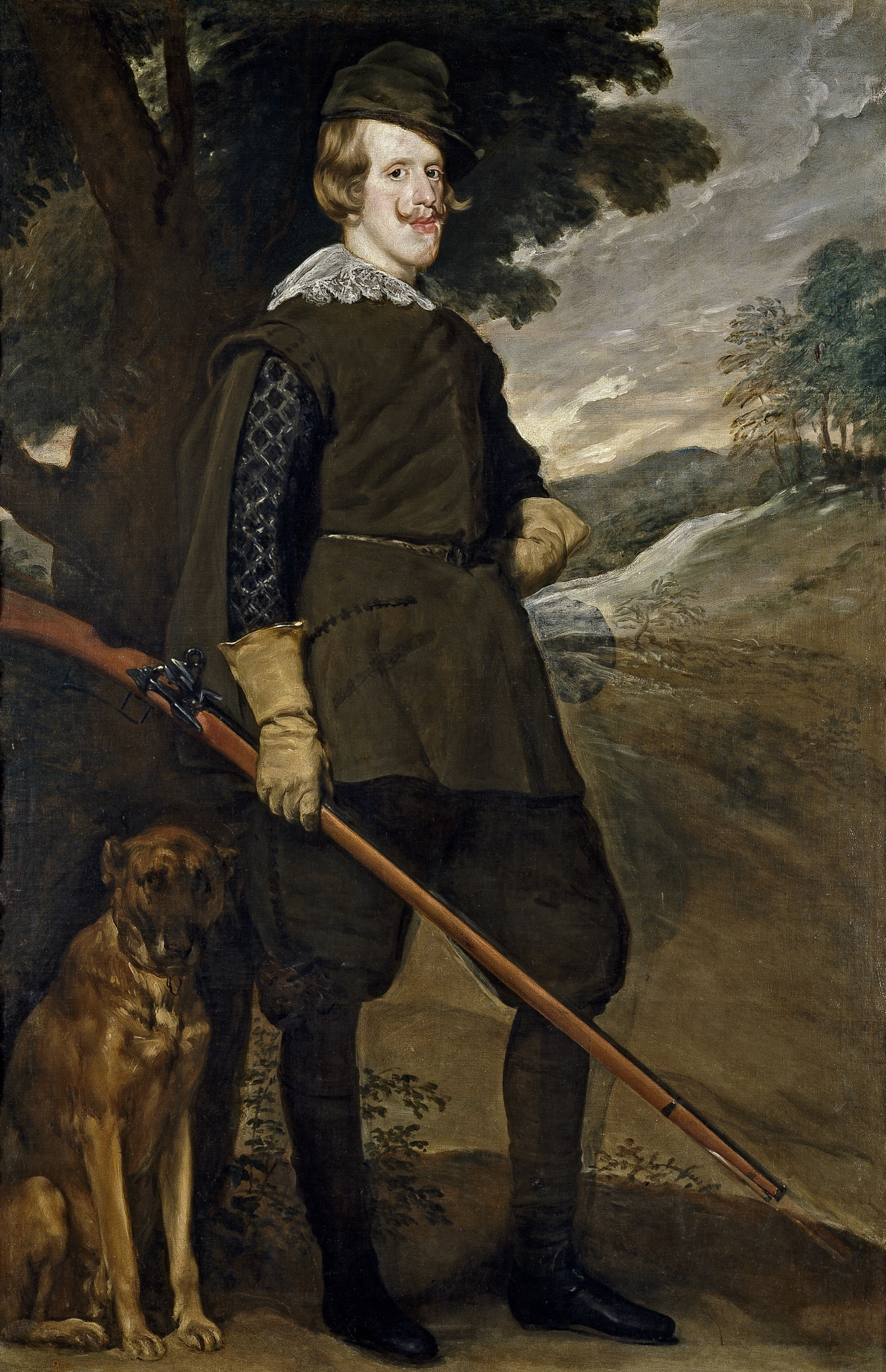 Retrato del rey Felipe IV de España (1601-1665), que fue hijo del rey Felipe III de España y de la reina Margarita de Austria.